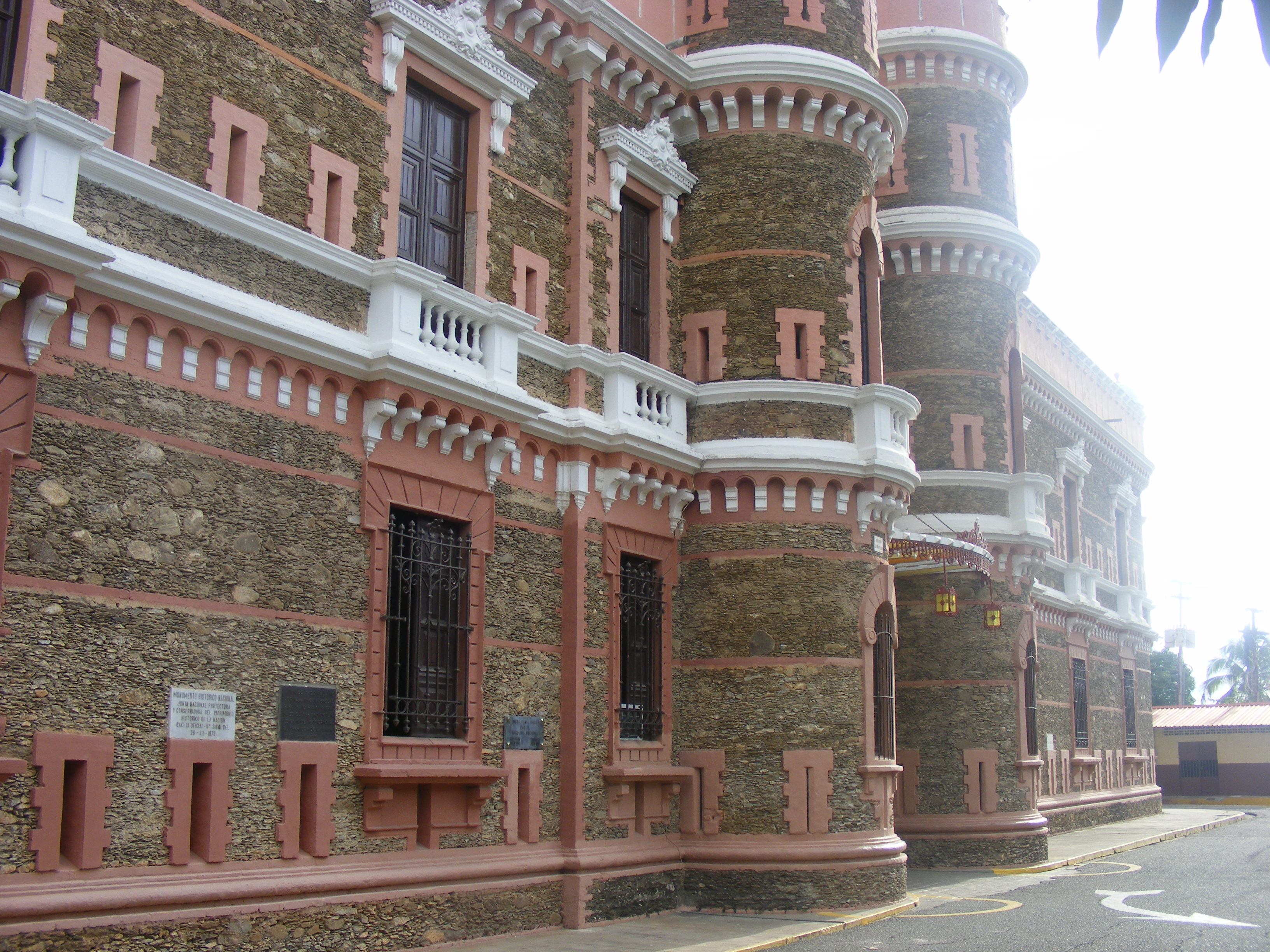 La Victoria, Edo. Aragua